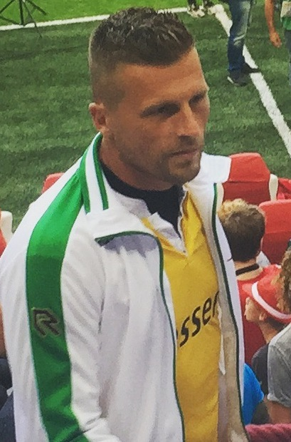 Tijdens de Johan Cruijff Schaal 2015. Johan Kappelhof, Peter van der Vlag en Abel Tamata.